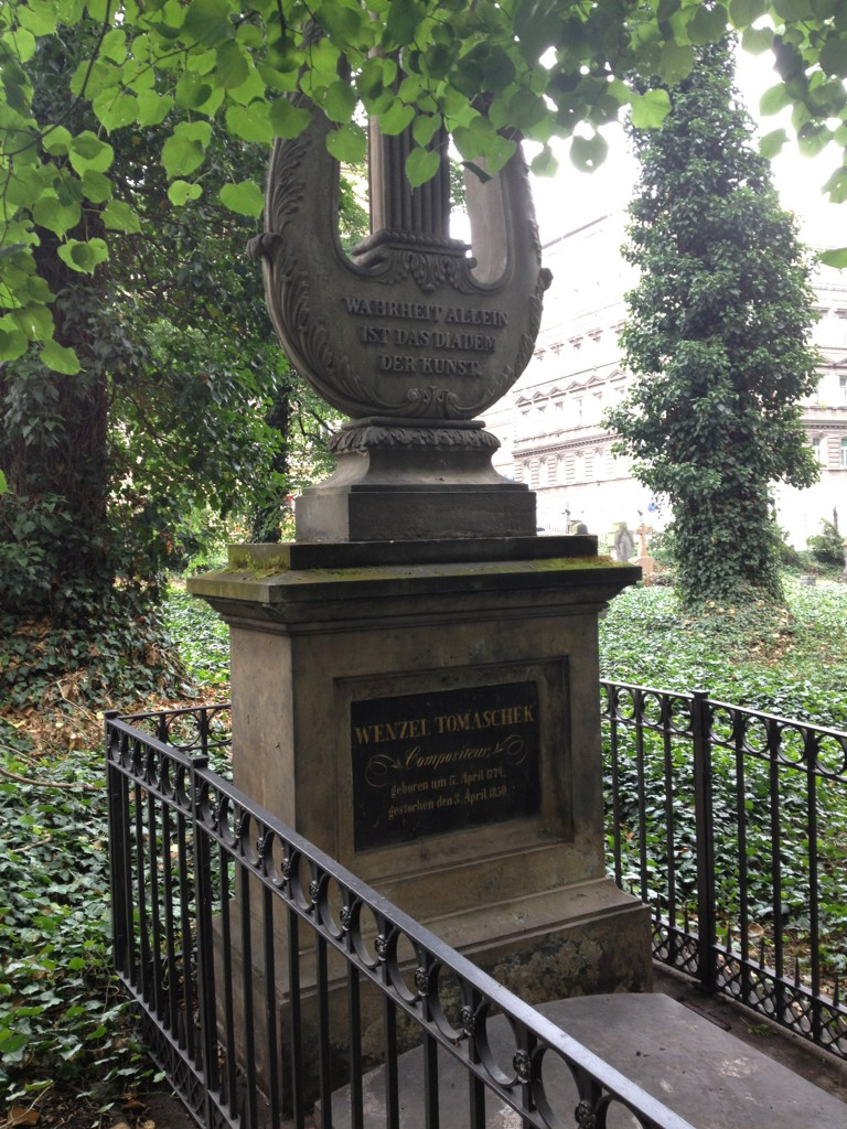 La tumba del compositor Tomascheck